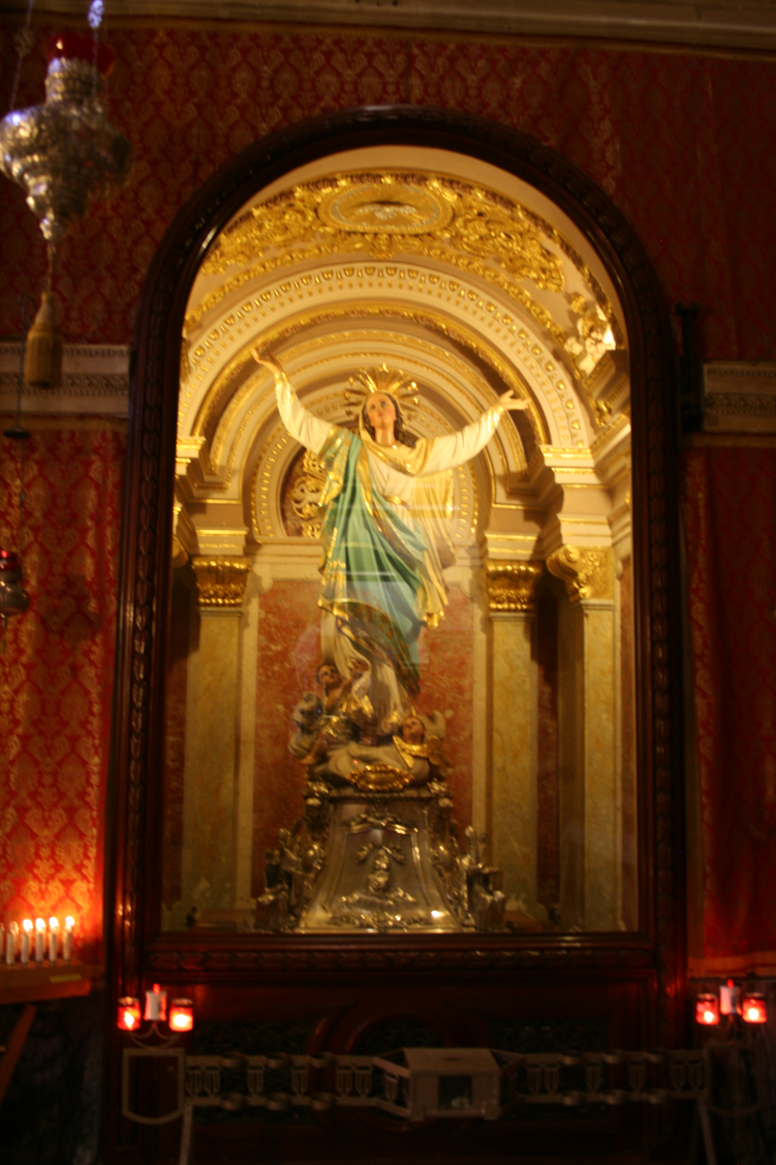 Statue der Maria in der Kathedrale Maria Himmelfahrt (Gozo)